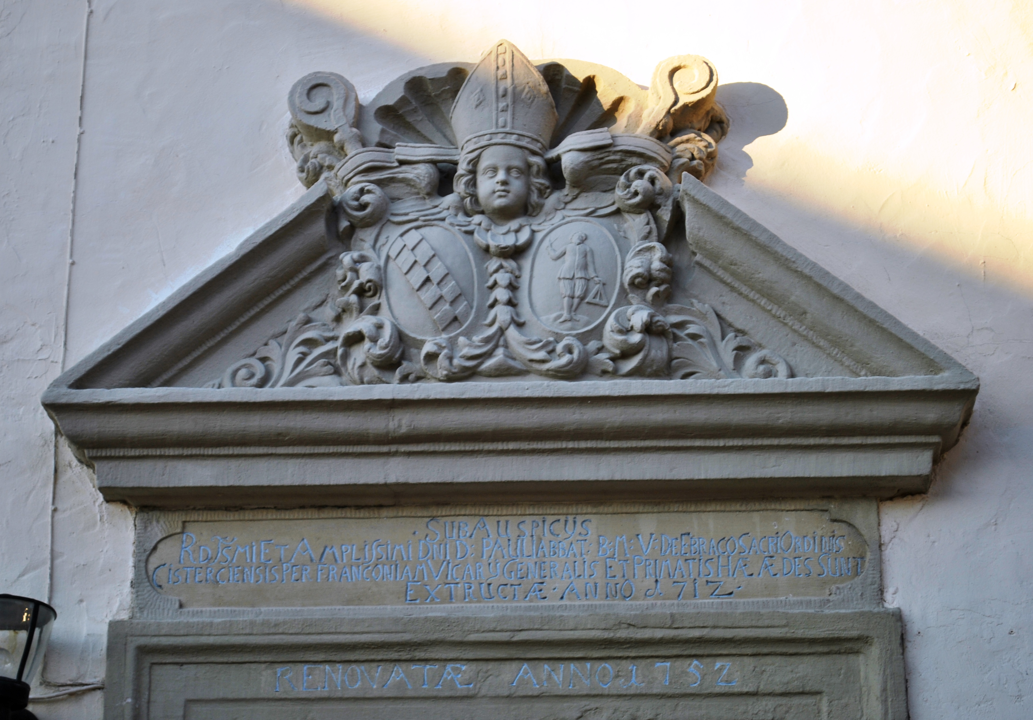 Ehemaliger Ebracher Hof Zweigeschossiger traufseitiger Satteldachbau mit Volutengiebel, geohrte Fensterrahmungen im Erdgeschoss, um 1600, Portal und Giebel bezeichnet „1712“ D-6-75-161-5